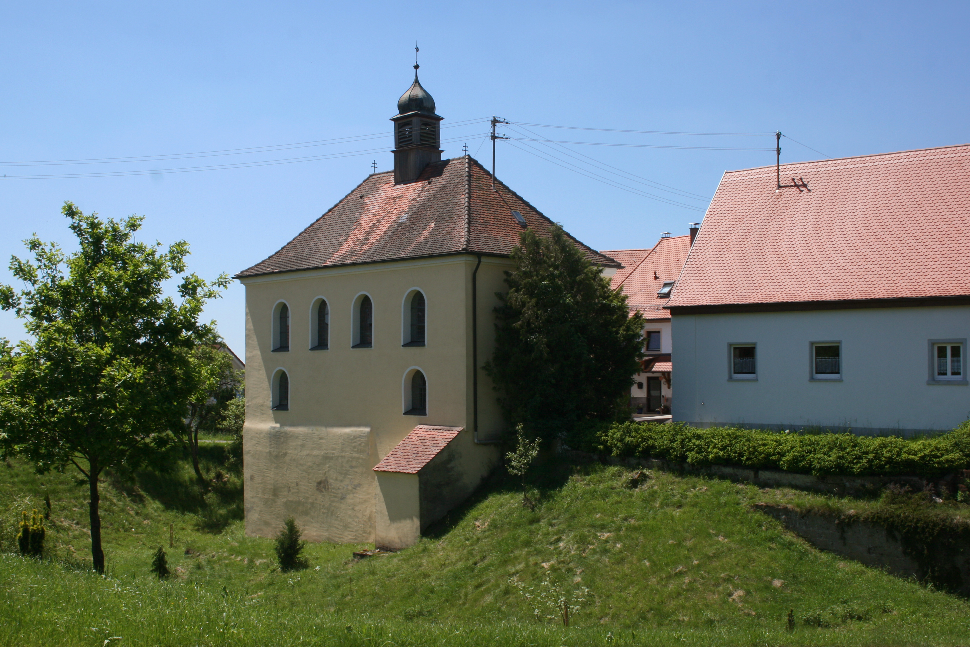 Katharinenkapelle mit Burgstall in Rötlen, einem Ortsteil von Ellwangen-Röhlingen